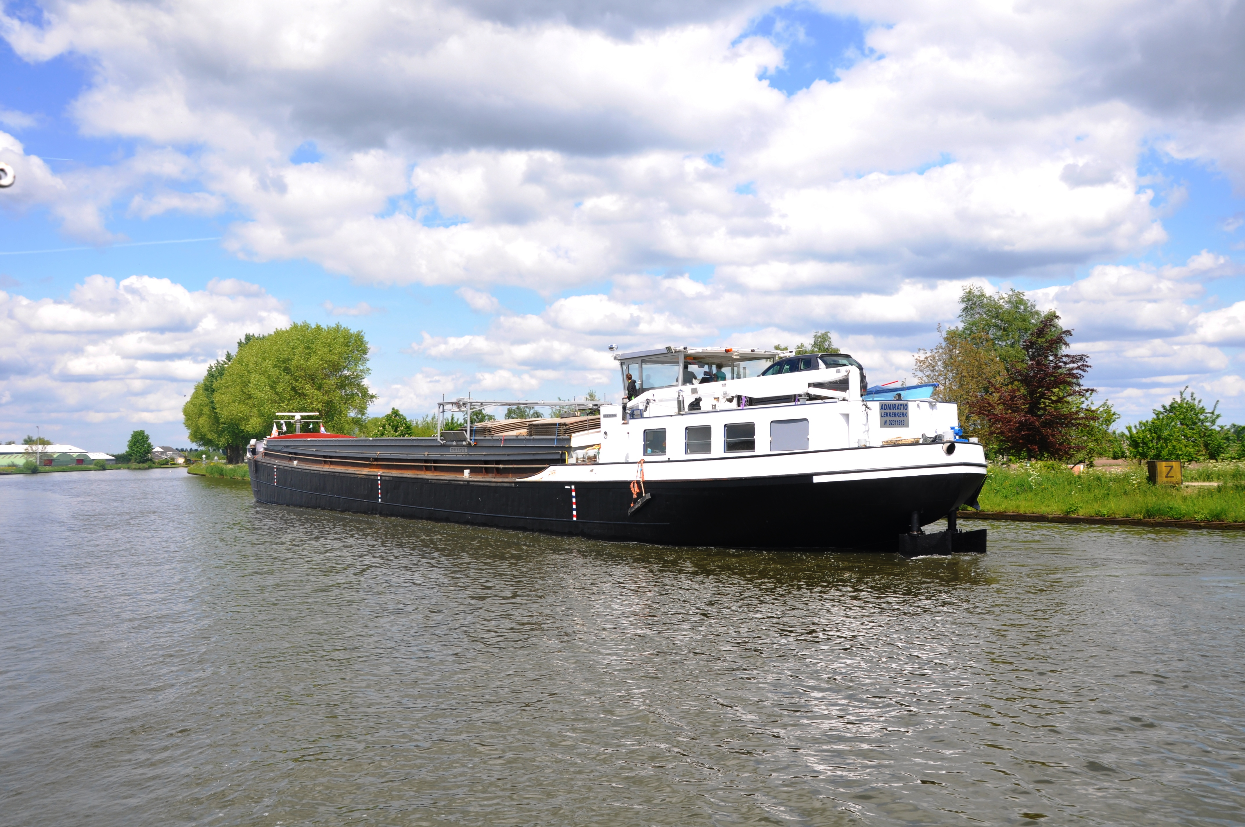 De ADMIRATIO komt door de spoorbrug Arkel op het Merwedekanaal.